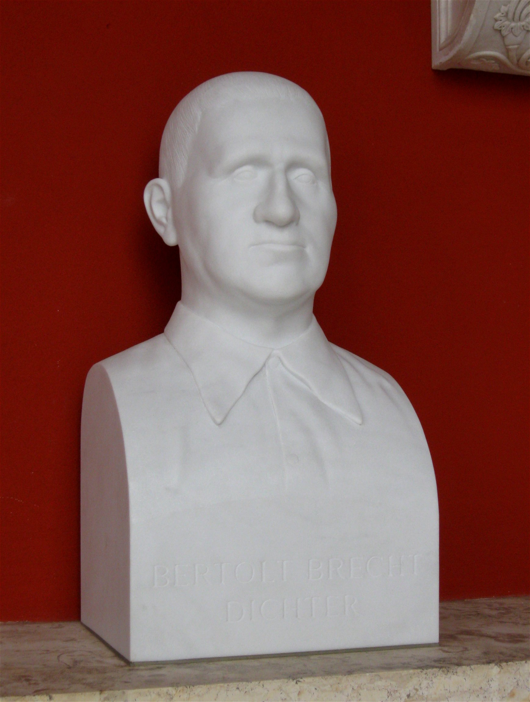 Ruhmeshalle München: Bertolt Brecht Dichter (im Jahre 2009 neu aufgestellt)